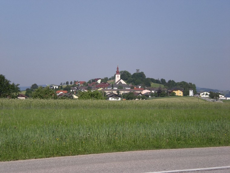 Kirchberg ob der Donau